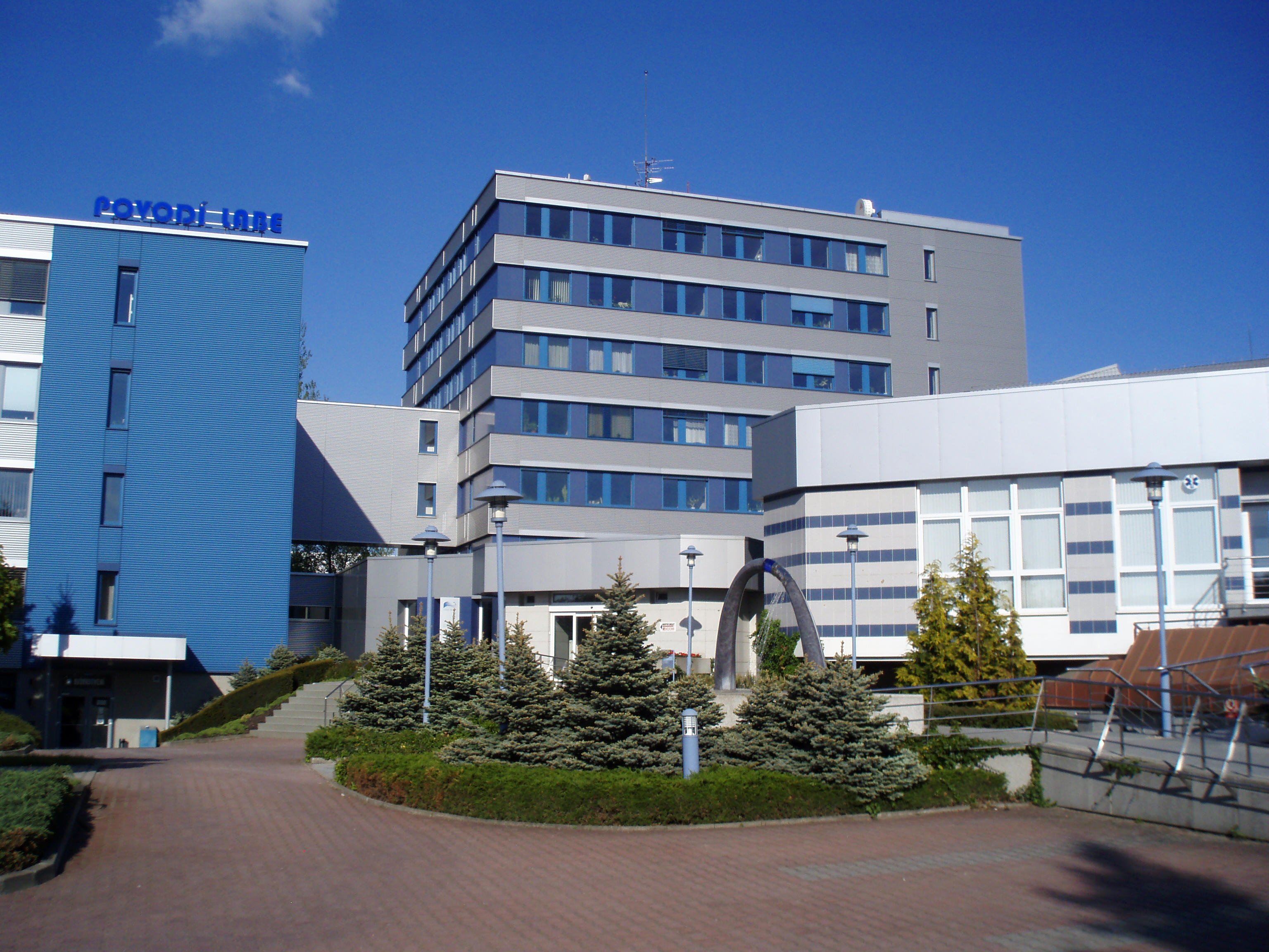 Sídlo Povodí Labe v Hradci Králové